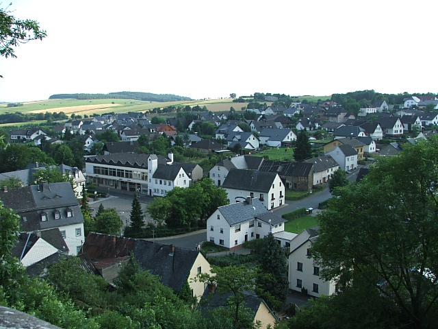 Beschreibung: Ulmener Zentrum mit Marktplatz und Bürgersaal, von der Burg betrachtet. Quelle: selbst fotografiert Fotograf: D. Steffes Datum der Aufnahme: 16.07.2005